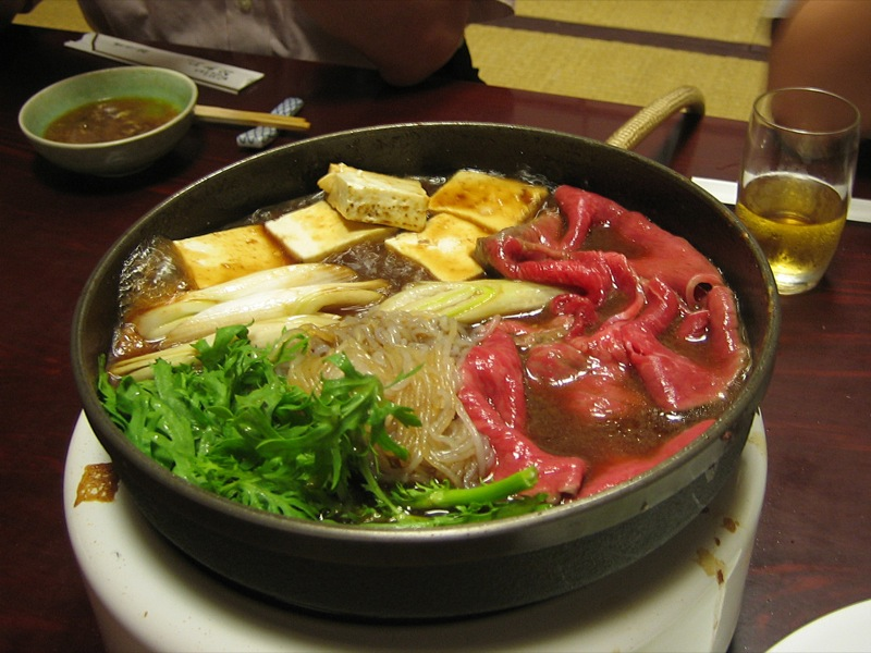 @echikatsu, yushima